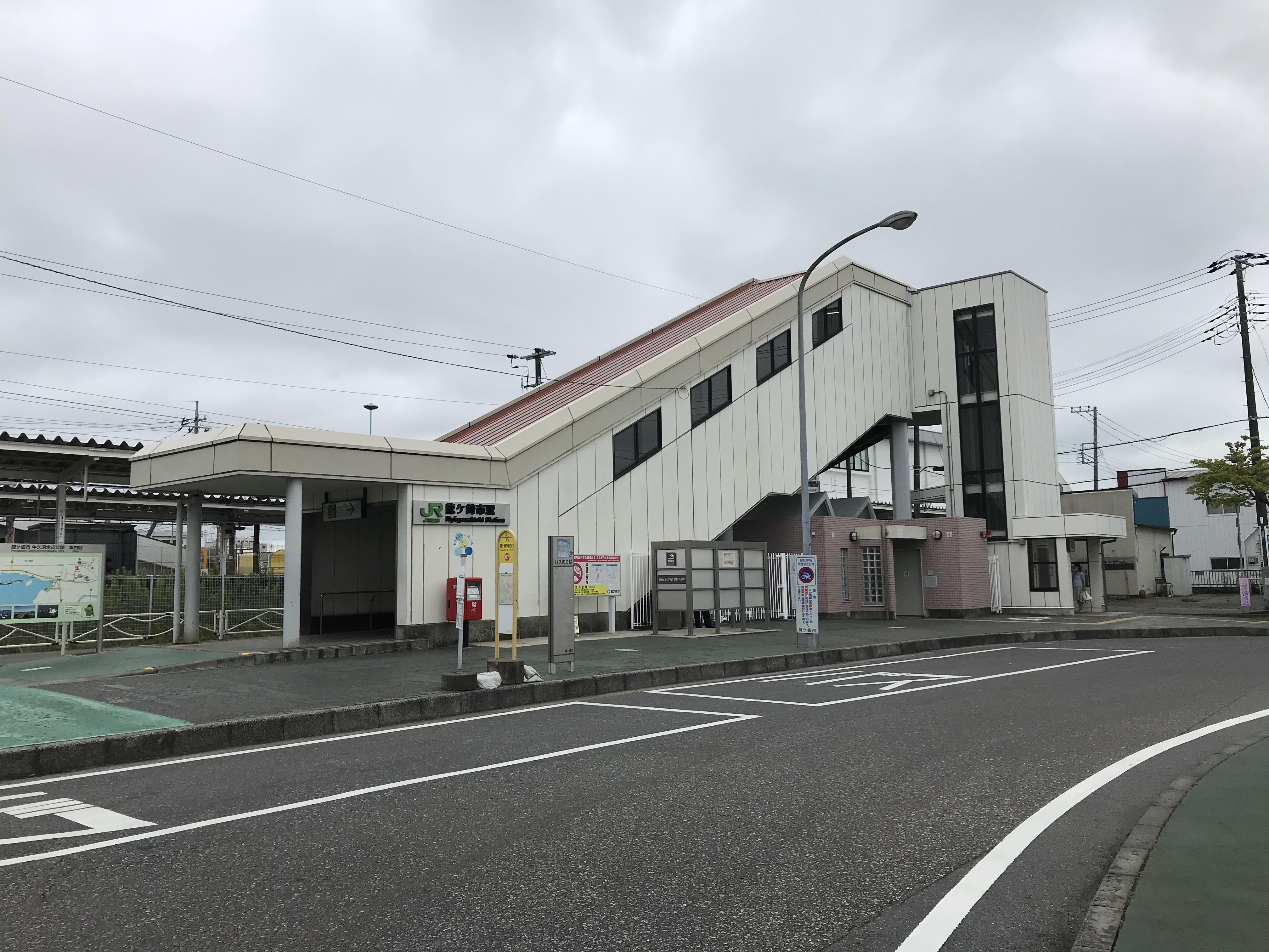 龍ケ崎市駅西口